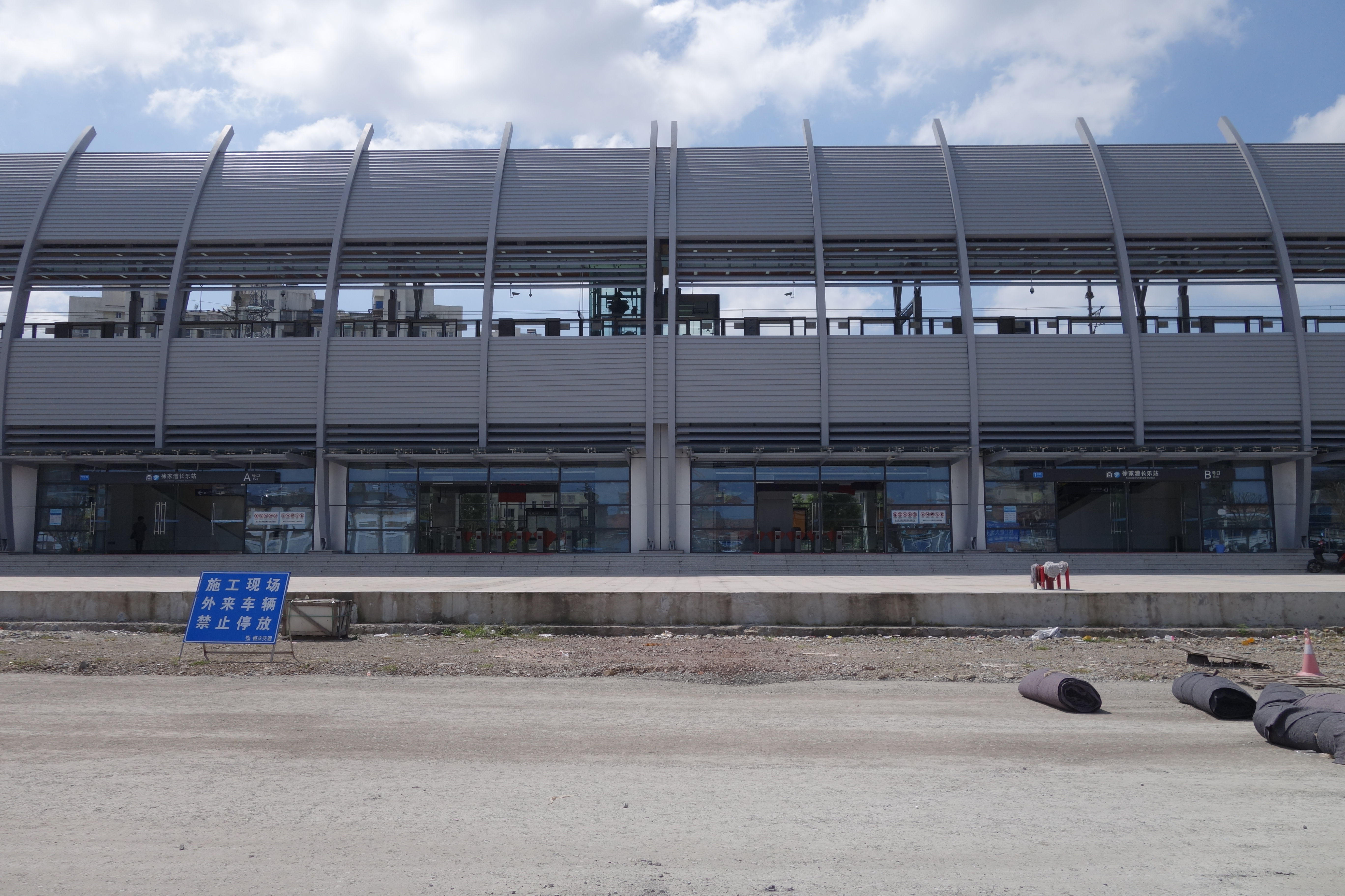 徐家漕长乐站